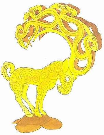 Szarvasnak átöltöztetett ló a kínai Ordoszból, Nalingaotuból